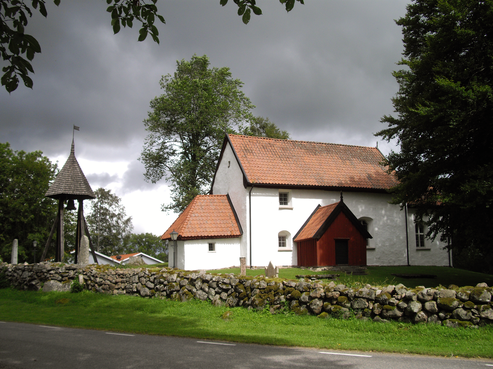 Eriksbergs gamla kyrka från söder